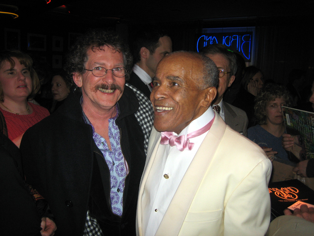 Jon Hendricks